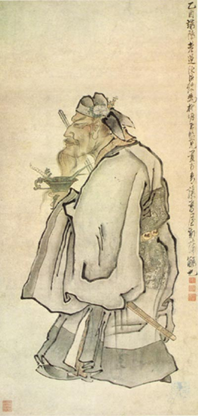 Zhong Kui